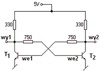 Zasada dzialania przerzutnika RS.